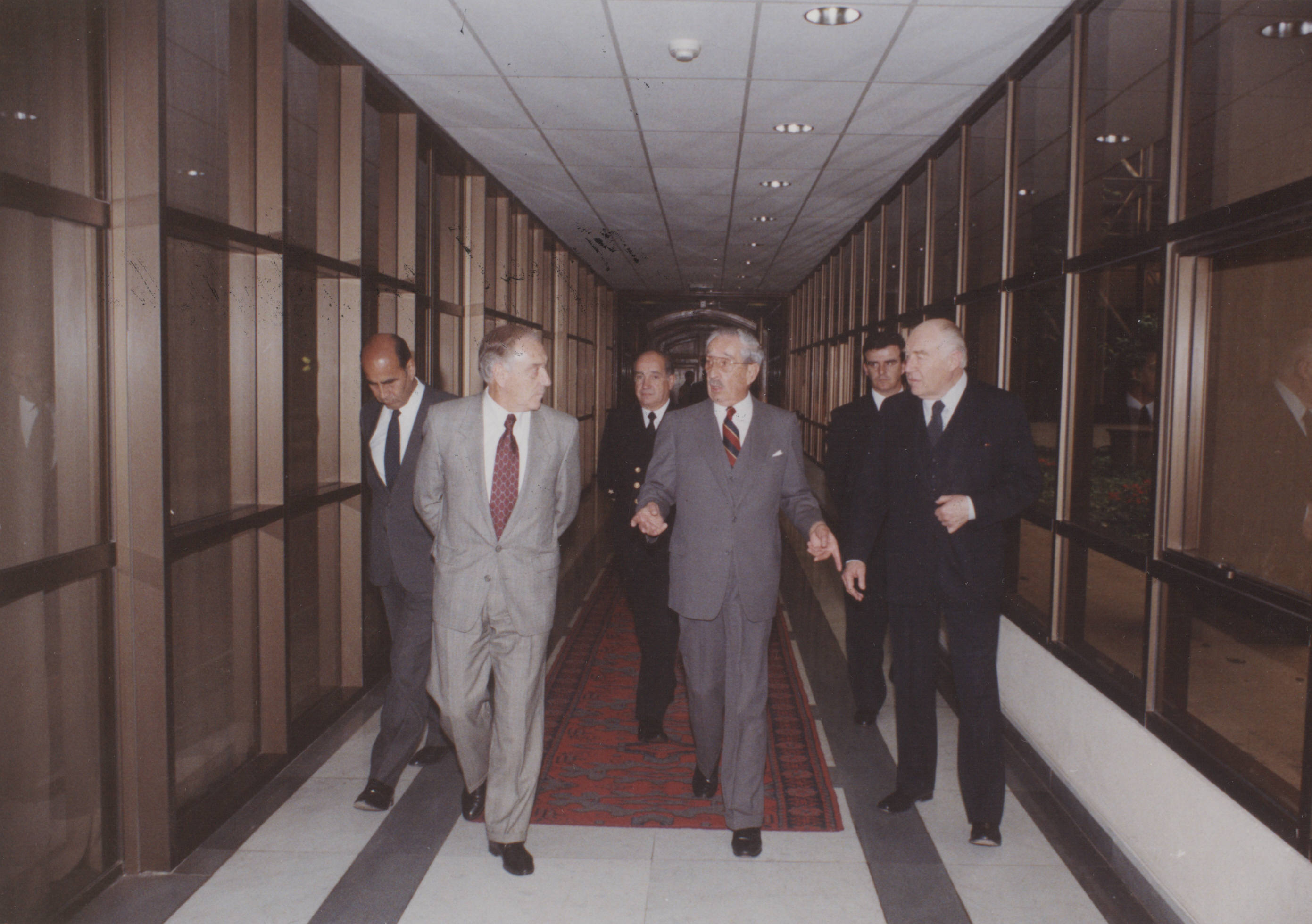 Miguel Otero, junto a José Toribio Merino y Sergio Onofre Jarpa, en dependencias del congreso nacional.